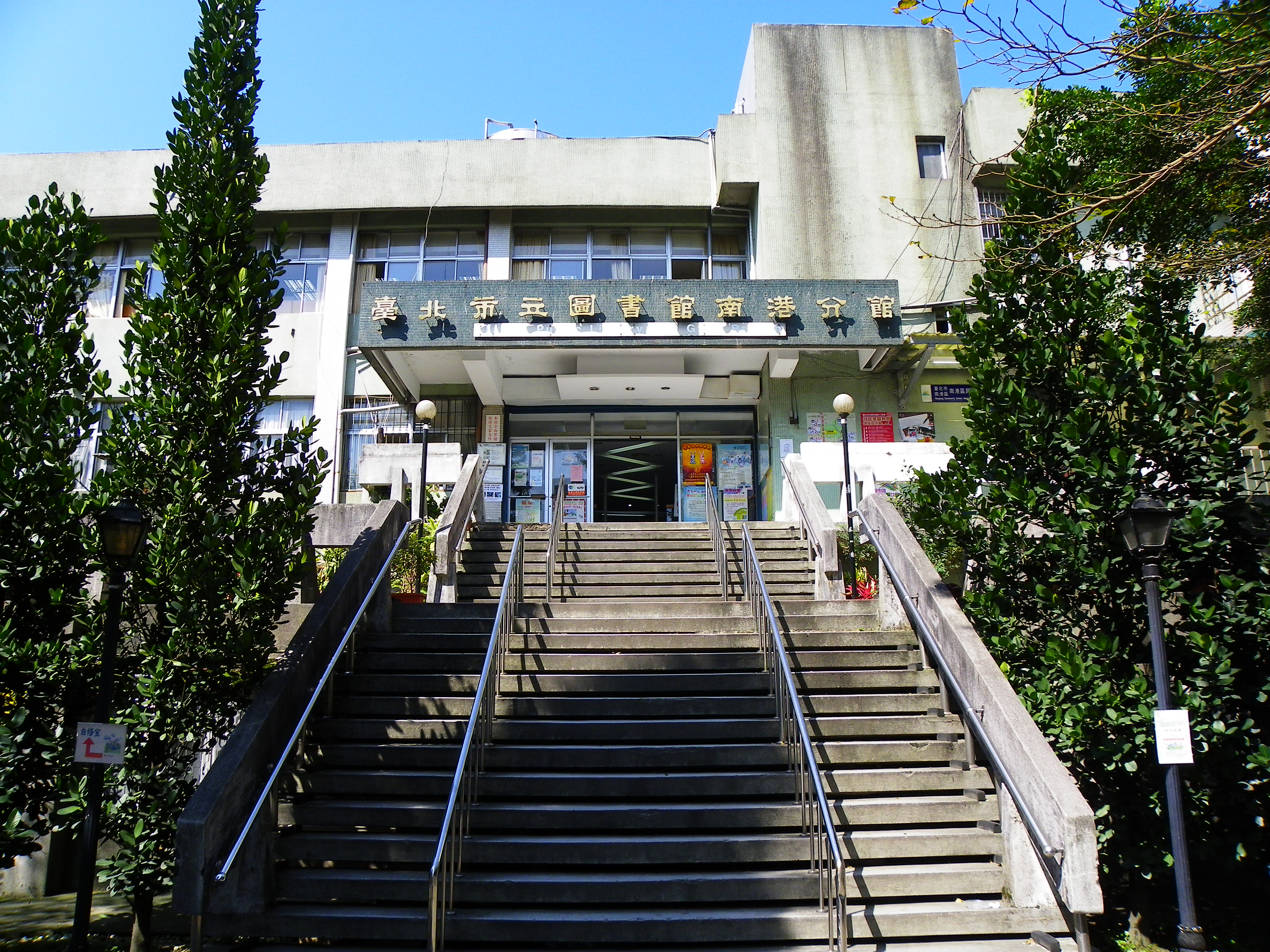 臺北市立圖書館南港分館北面入口。1990年代基隆河截彎取直工程前，臺北市南港區多水災，故區公所、圖書館等入口均設於高層，以避洪患。